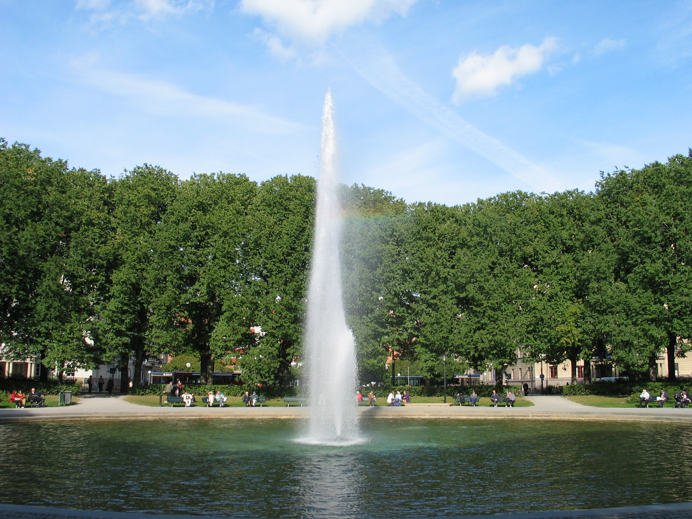 Karlaplan, Stockholm, Sweden.